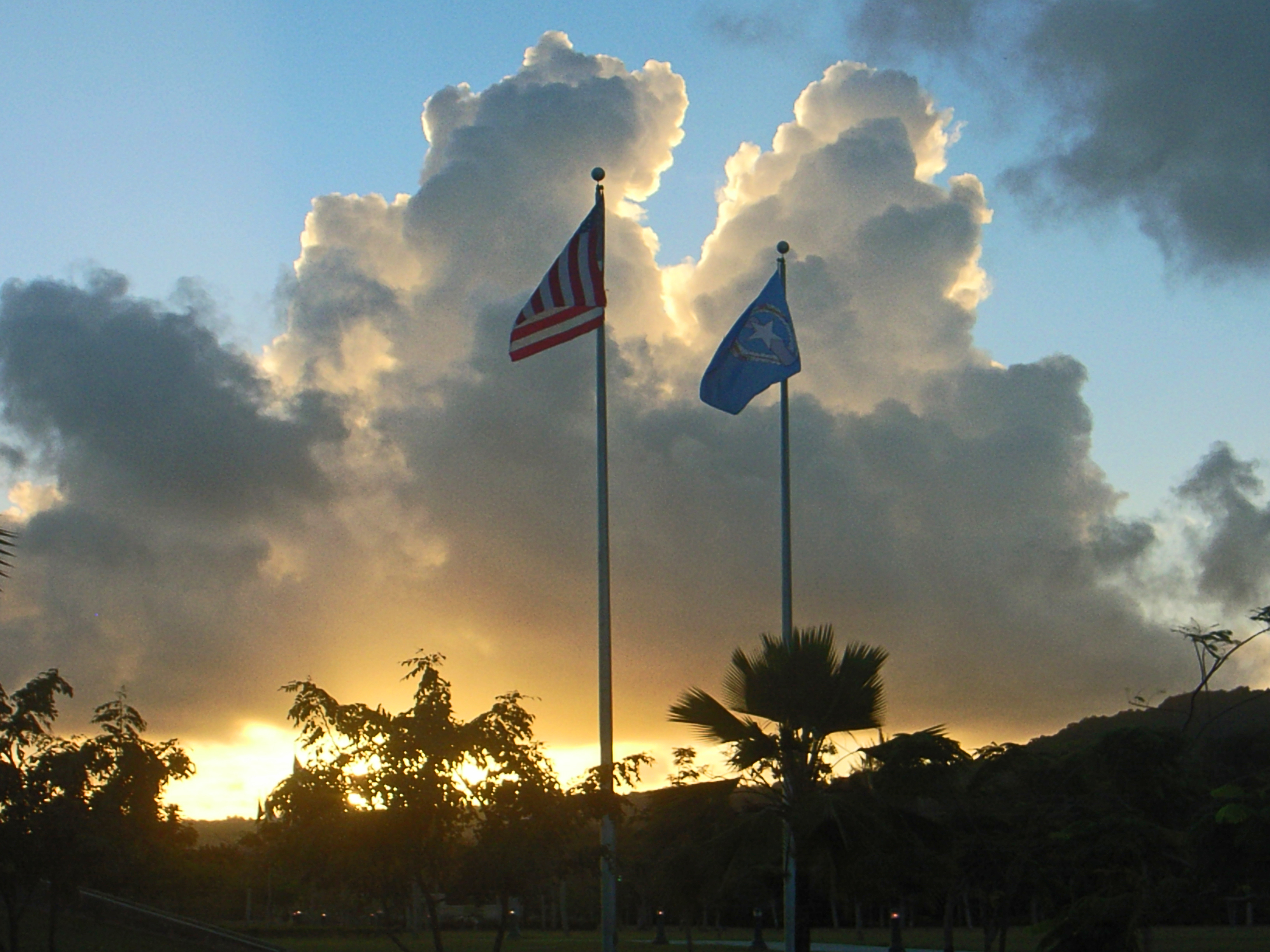 American Memorial Park, Saipan